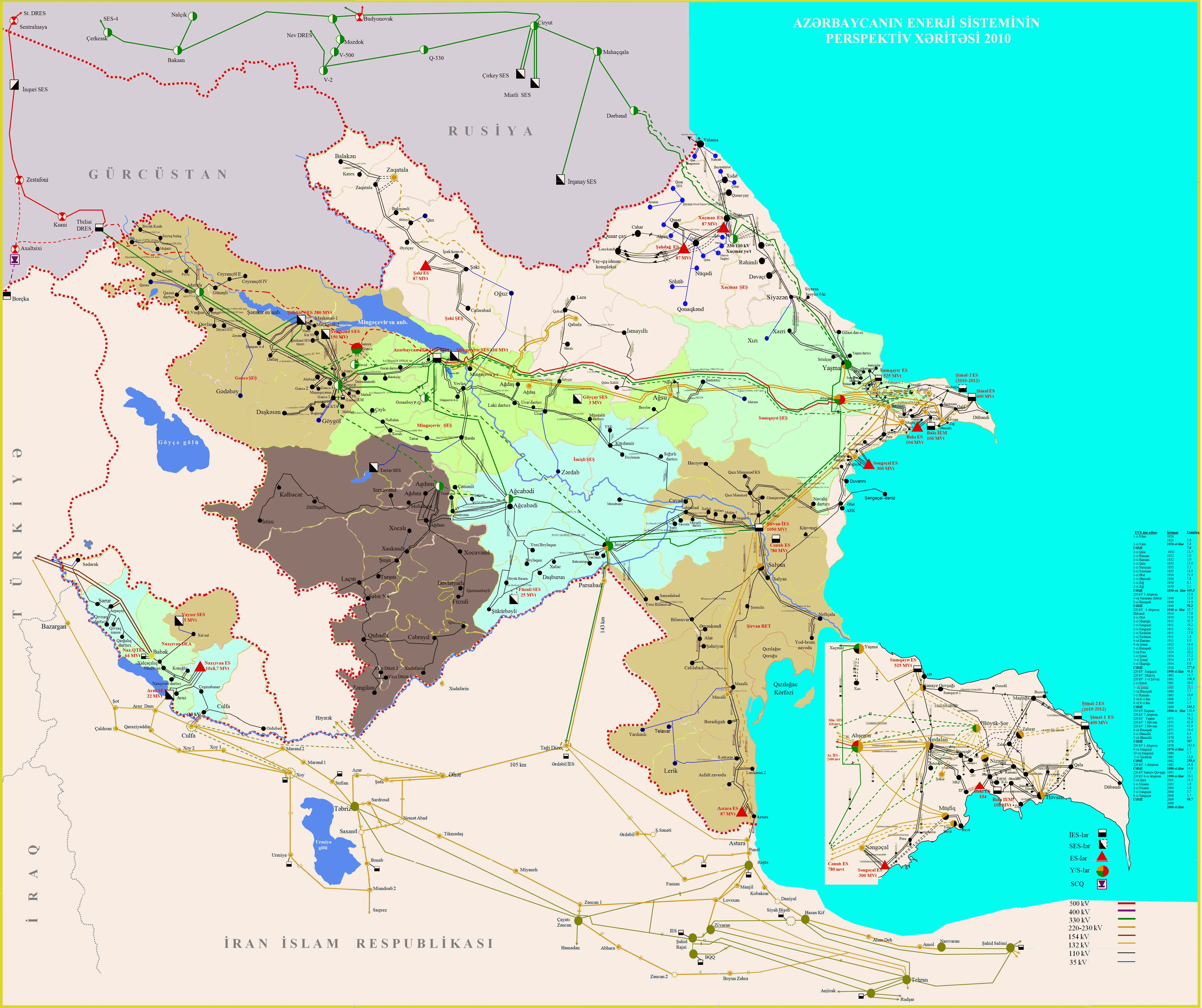 xerite